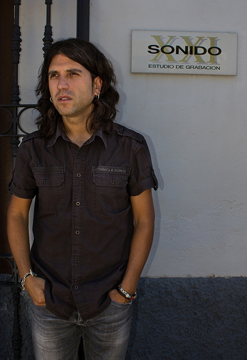 Rulo en 2012